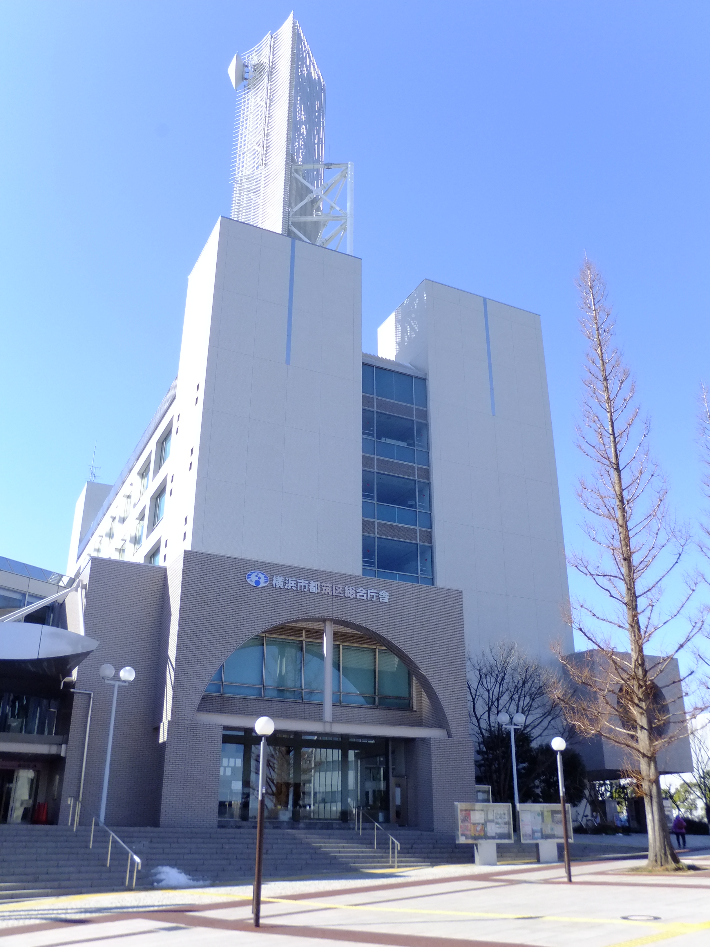 横浜市都筑区総合庁舎